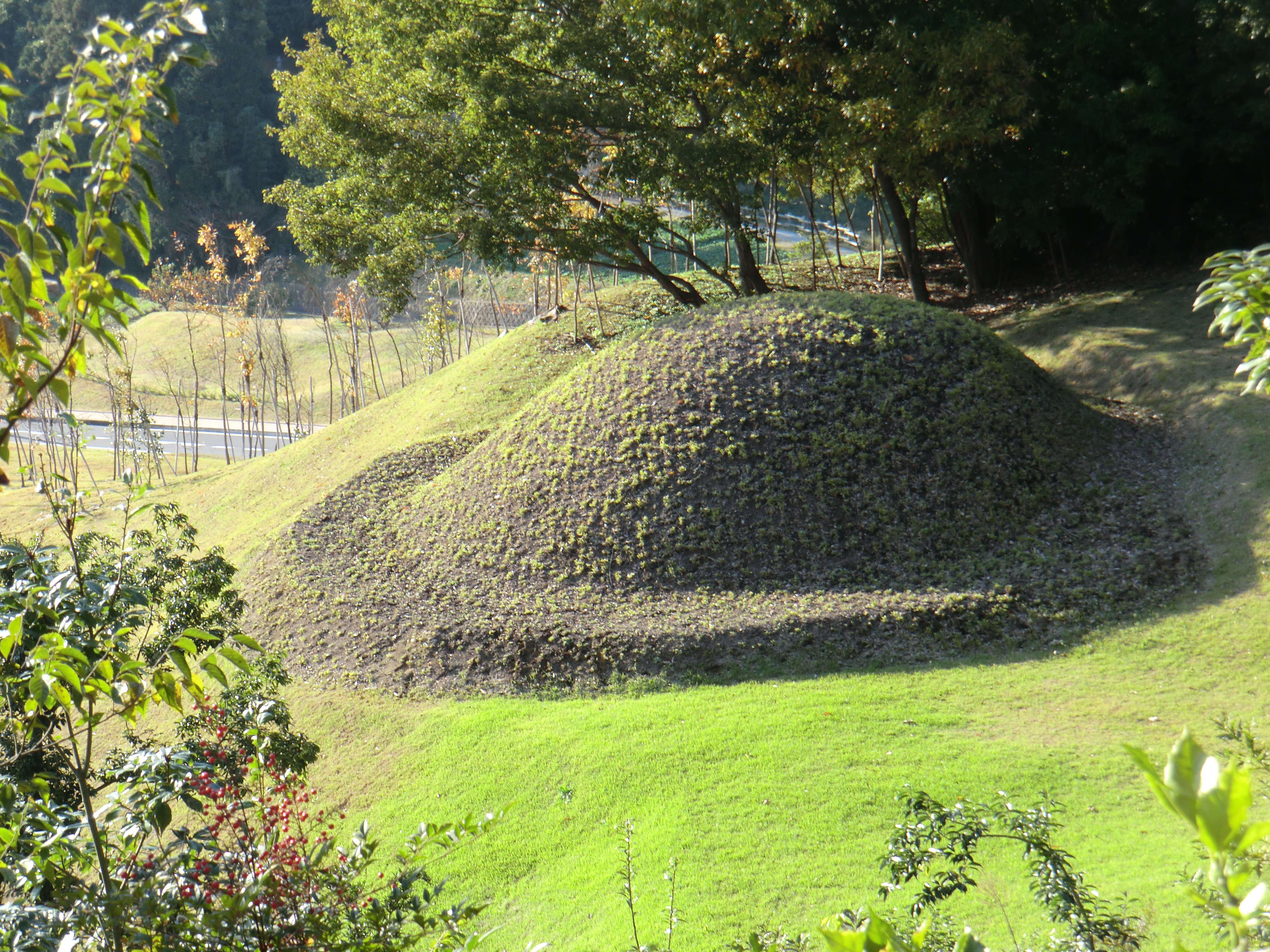 キトラ古墳 (2016年11月撮影)